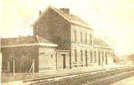 Het stationsgebouw te Munkzwalm(begin 20e eeuw)